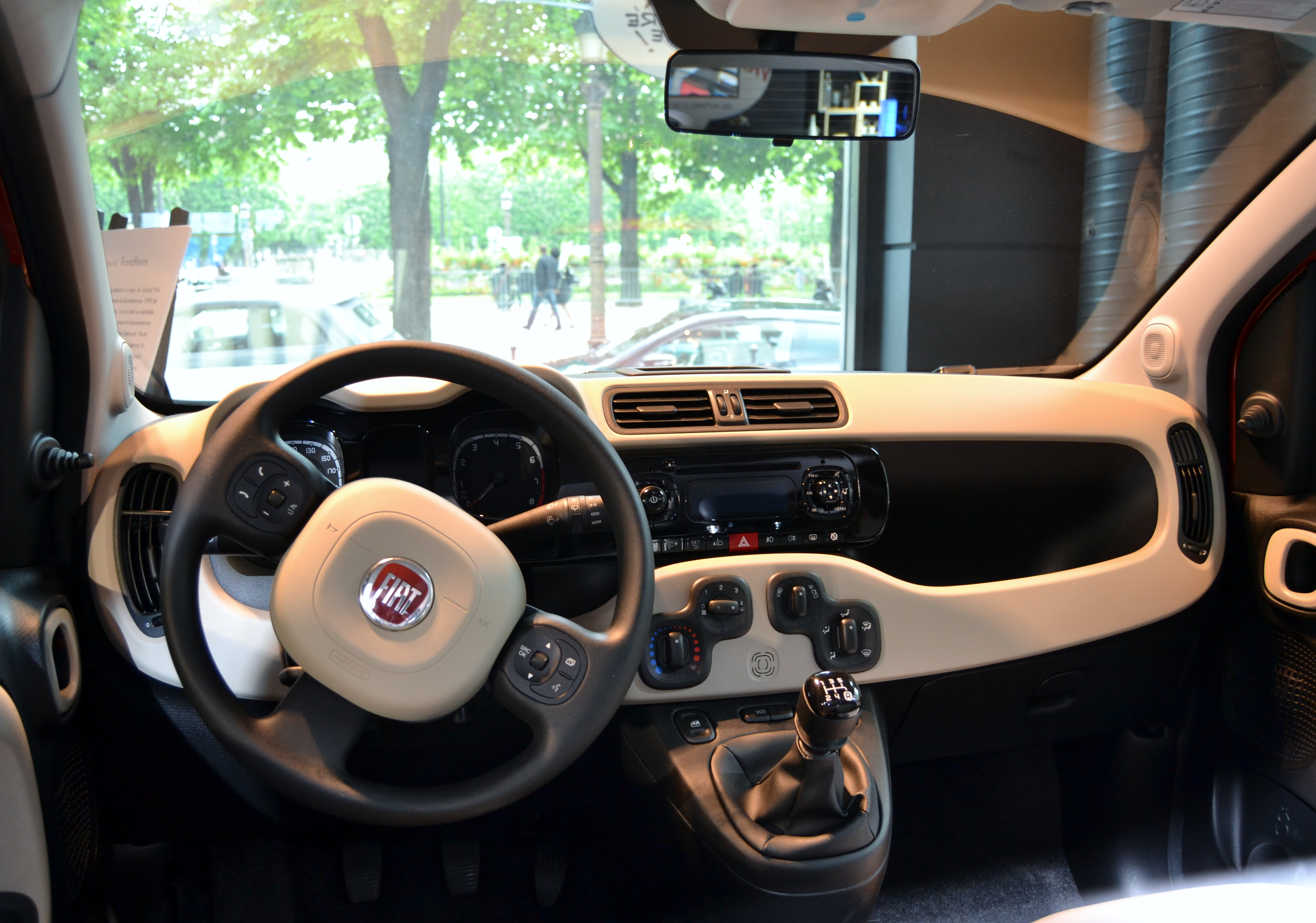 Fiat Panda 2012 - Vista interior